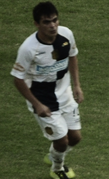 Partido del 18 de marzo de 2013, Rosario Central 2-Olimpo 2; Antonio Medina de Rosario Central.